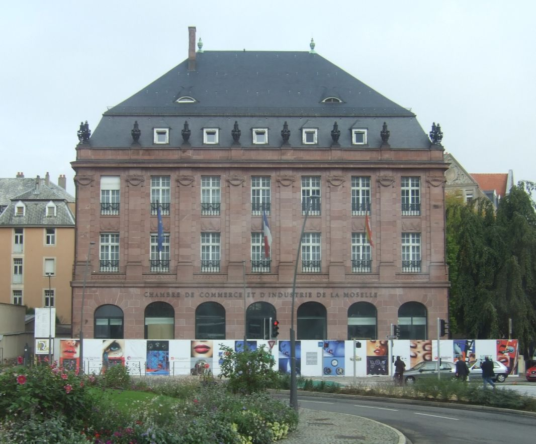 CCI de la Moselle, Metz